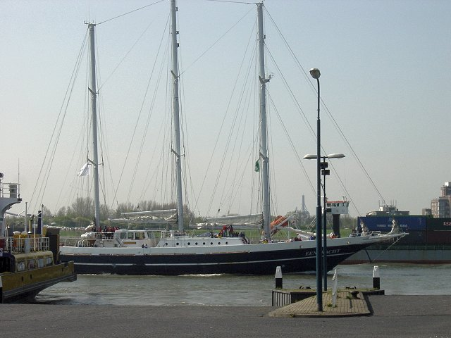 Driemast gaffeltopzeilnl:schoener Eendracht (voorlopige foto)